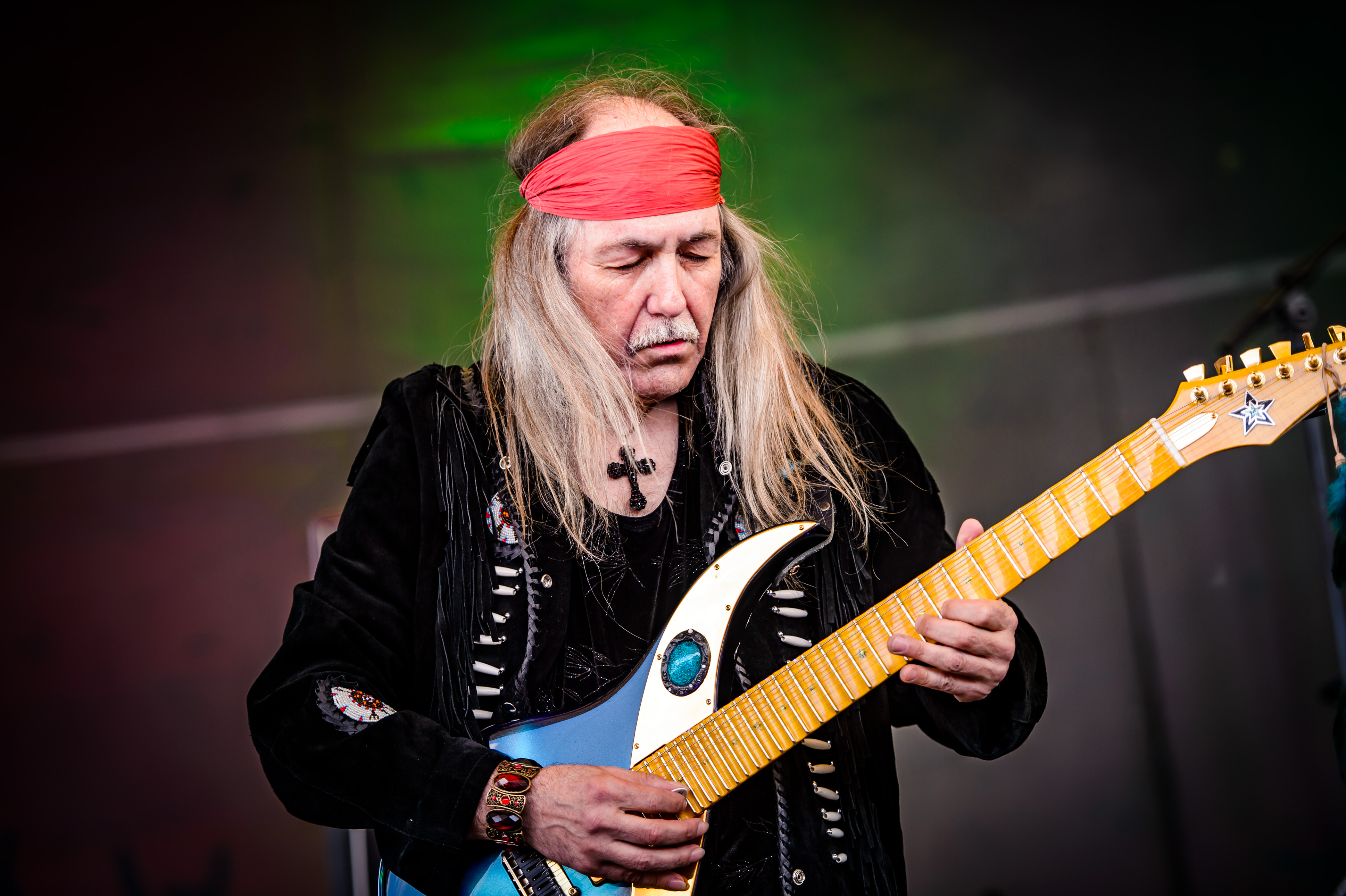 'Rock Hard Festival 2018; Amphitheater Gelsenkirchen': 'Uli Jon Roth'